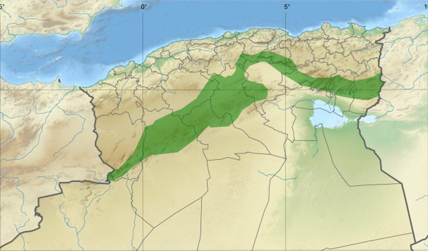 Algérie, barrage vert